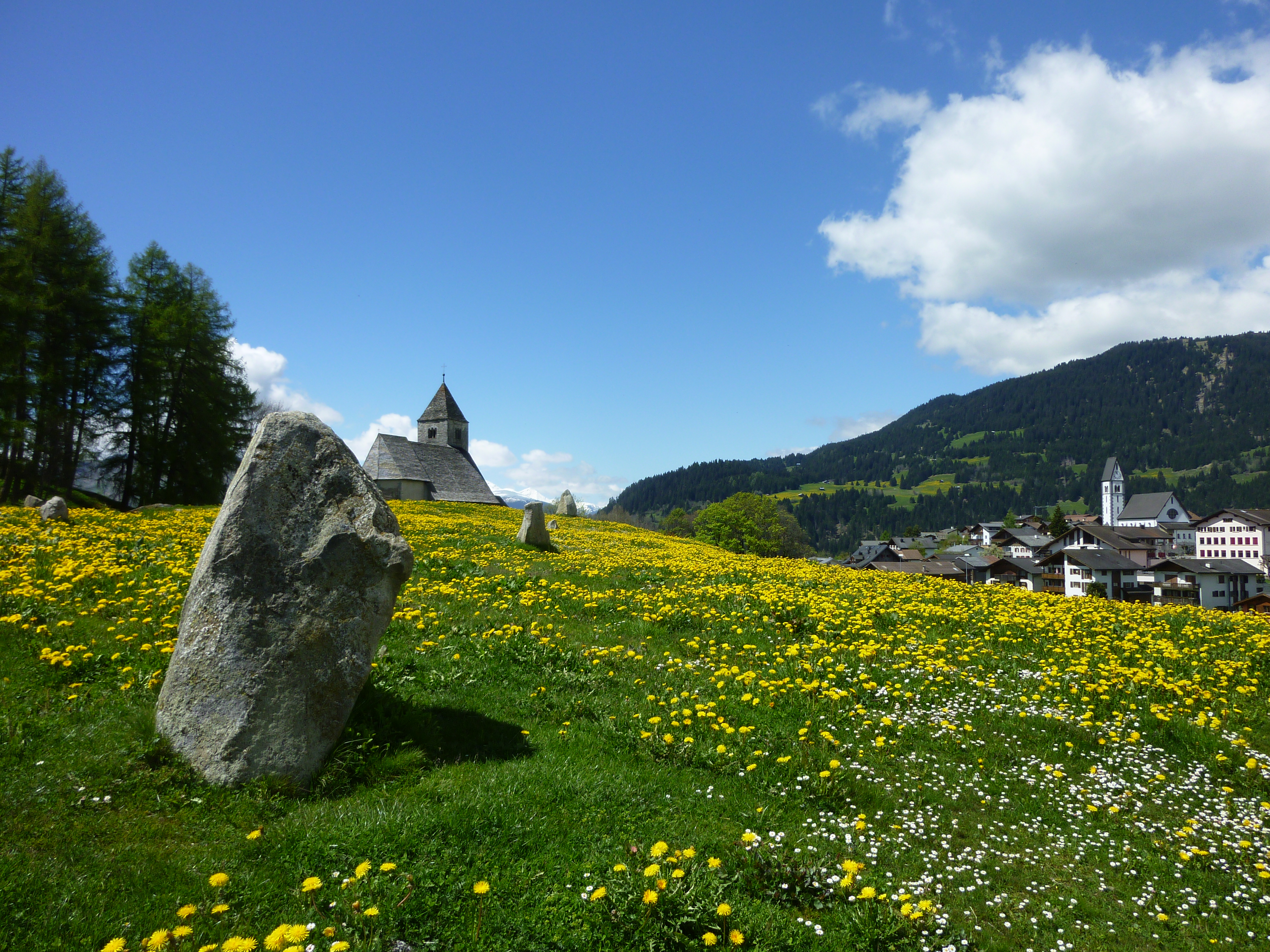 Menhire auf Planezzas in Falera